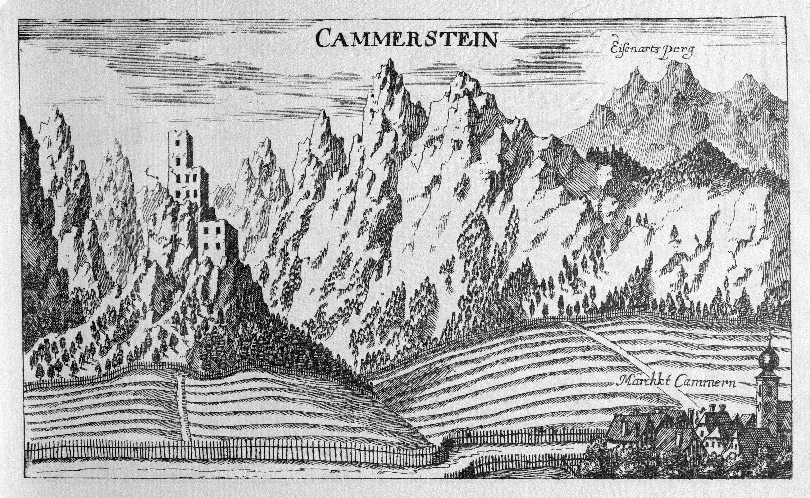 G. M. Vischers Käyserlichen Geographi, Topographia Ducatus Stiriae, Das ist: Eigentliche Delineation / und Abbildung aller Städte / Schlösser / Marcktfleck / Lustgärten / Probsteyen / Stiffter / Clöster und Kirchen / so es sich im Herzogthumb Steyrmarck befinden; Und anjetzo Umb einen billichen Preyß zu finden seynd Bey Johann Bitsch Universitäts Buchhandlern / Auff dem Juden=Platz bey der guldenen Saulen. Graz 1681 Die Nummerierung der Dateien folgt der alphabetischen Reihung der Ortsnamen